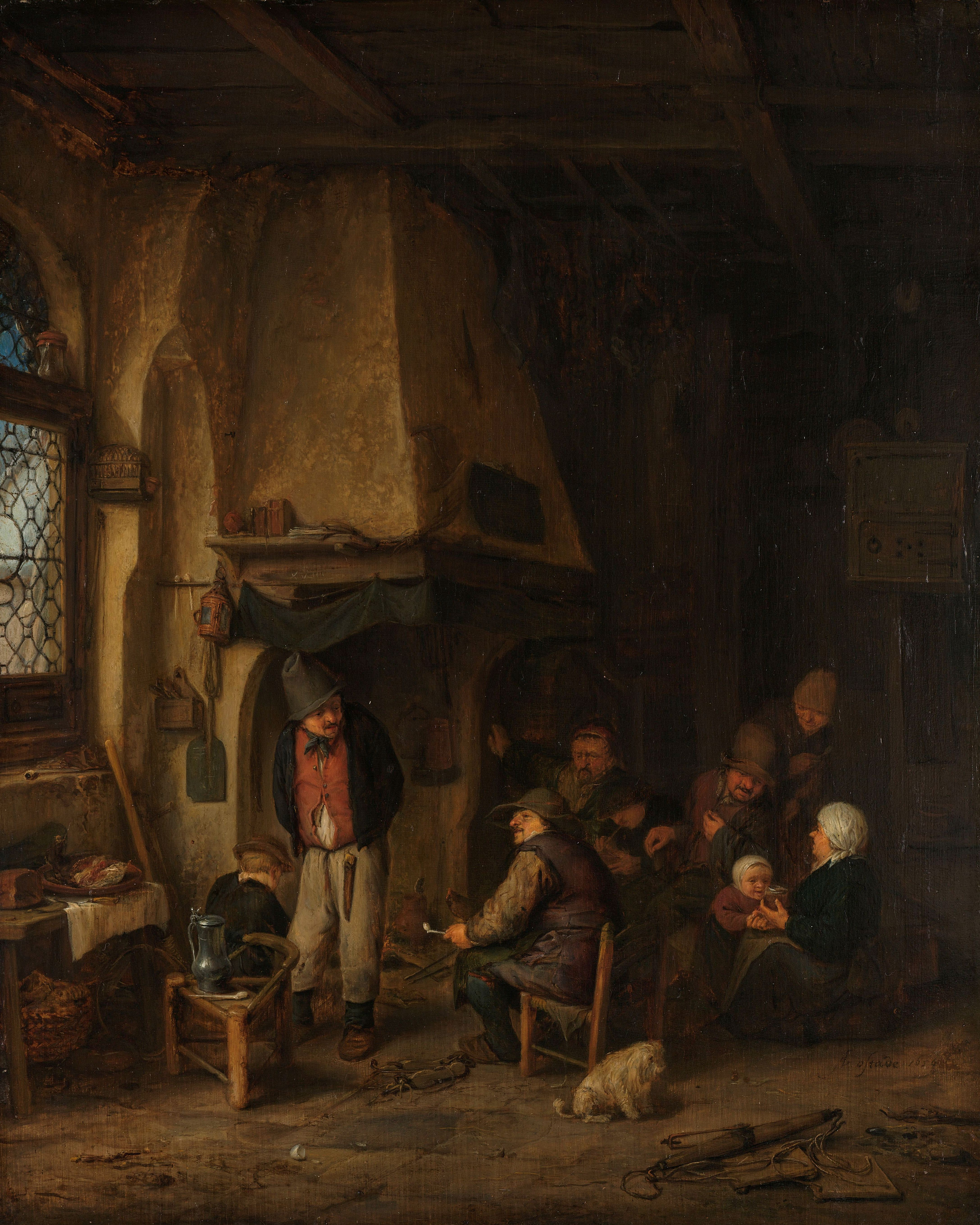 Voorstelling bekend onder de titel 'De Schaatsenrijders'. Herberginterieur met een groep boeren die zich rond de haard hebben verzameld. Rechts een vrouw met een kind, links een staande man met de handen op de rug. Op de grond ligt een paar schaatsen. Op de voorgrond rechts een hondje en een juk, links voor het raam staat een tafeltje met brood en een kan en pijp op een krukje.; Adriaen van Ostade (1610–1685), olieverf op paneel, 1650